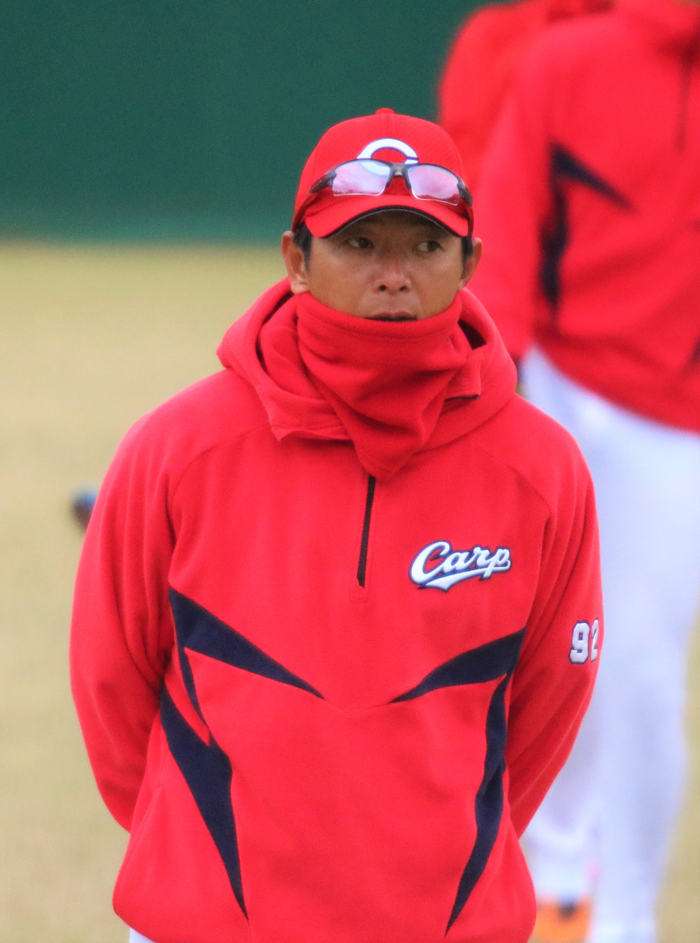 2017/11/20 由宇練習場